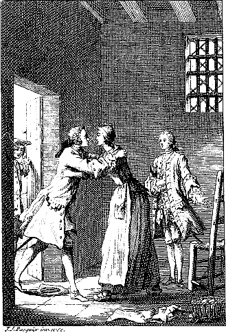 Illustration of Abbé Prévost's Histoire du Chevalier Des Grieux et de Manon Lescaut